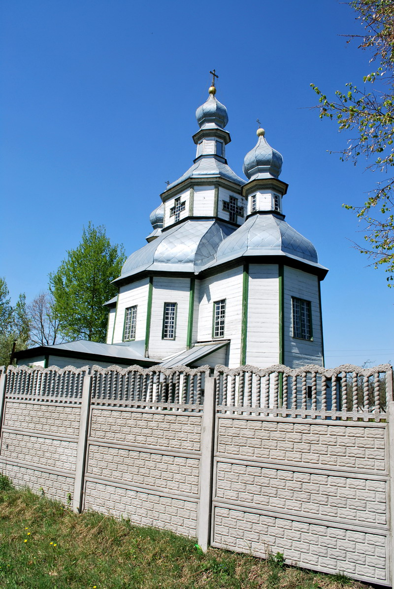 Церква у с. Синявка Менського району: Фотографія церкви у с. Синявка Менського району Чернігівської області